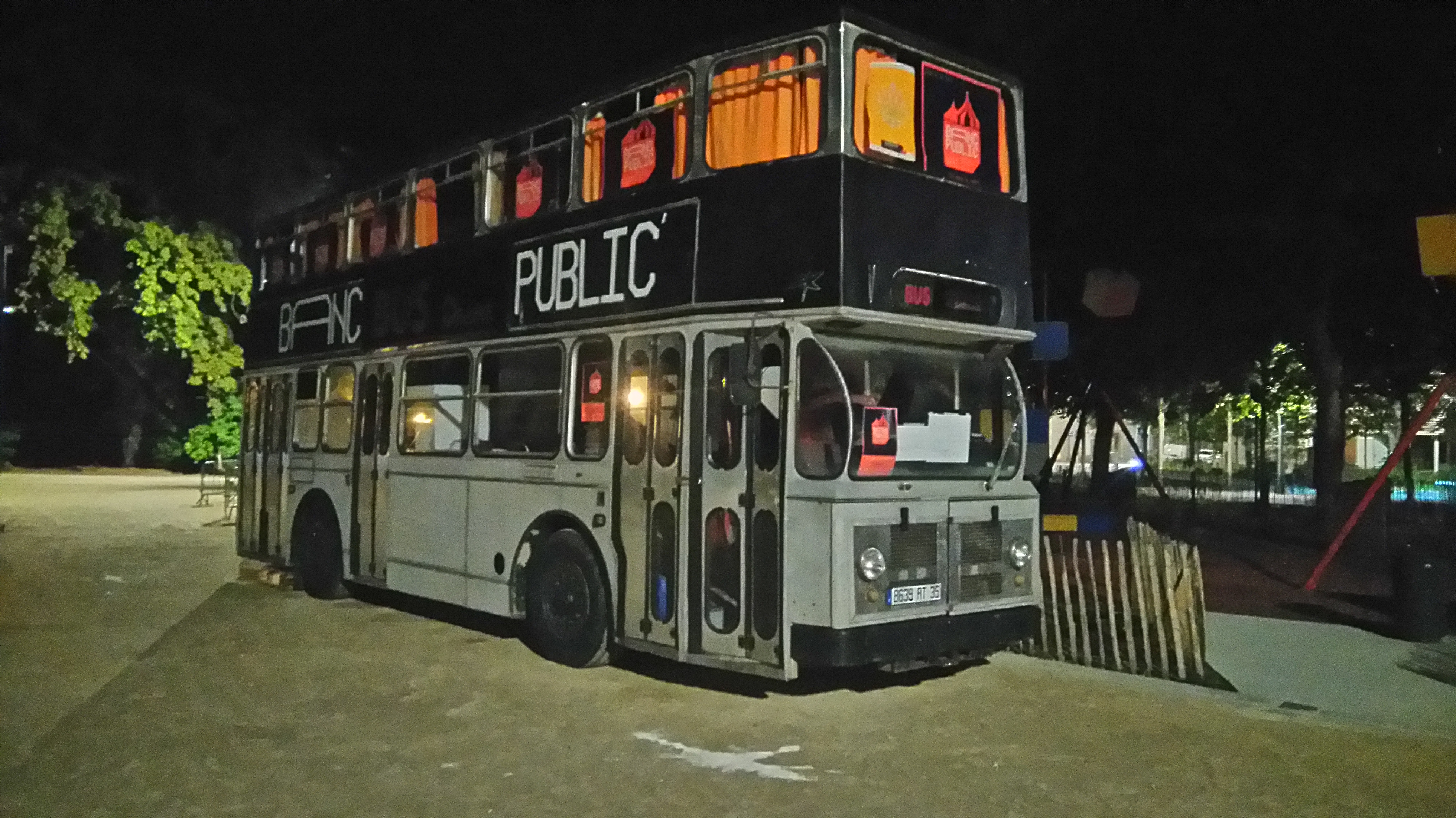 Berliet PCMRE